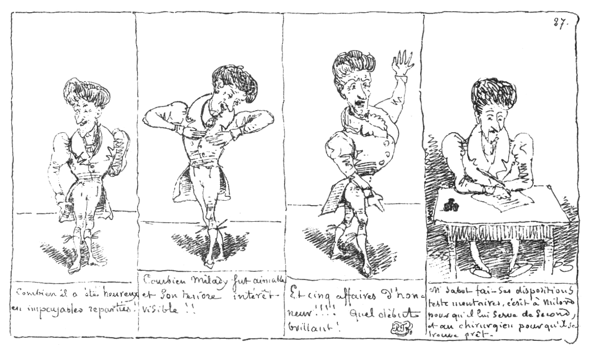 Page 27, Histoire de monsieur Jabot, édition de 1833